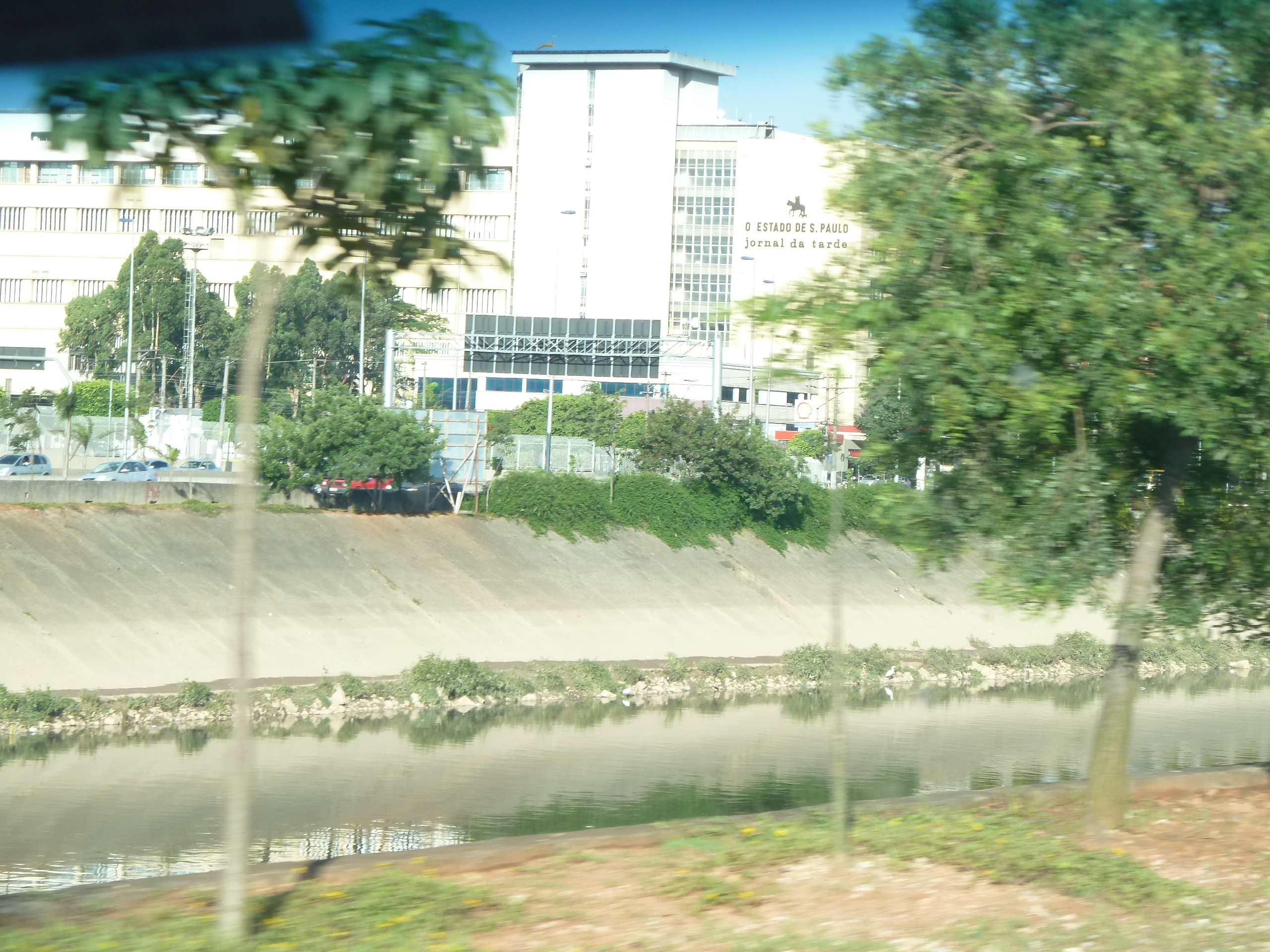 Rio Tietê na Marginal do Tietê - quase limpo!